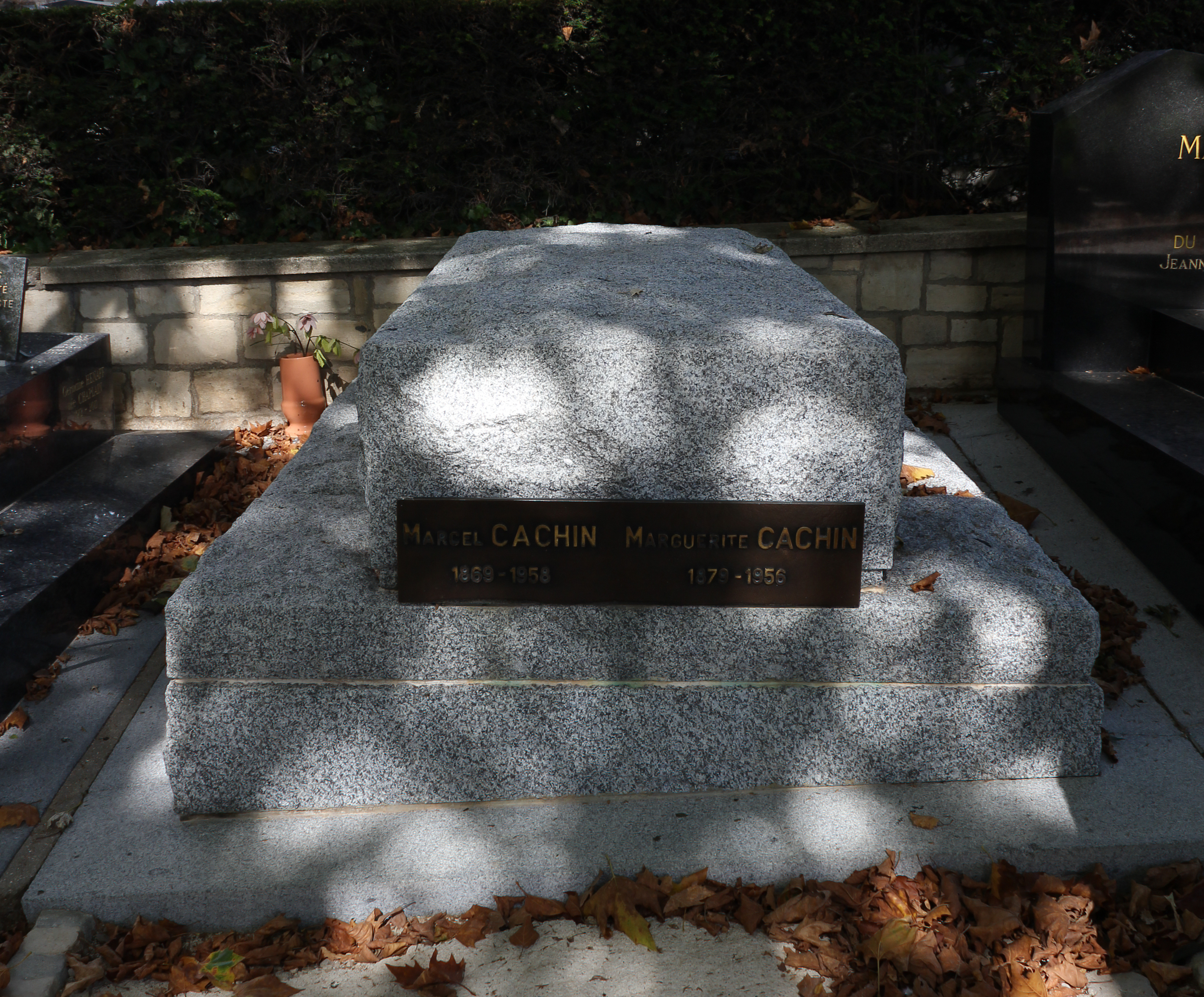 Vue d'ensemble